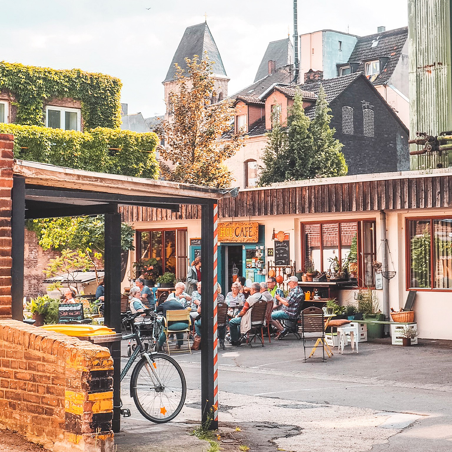 Uniongewerbehof auf dem HSP Areal